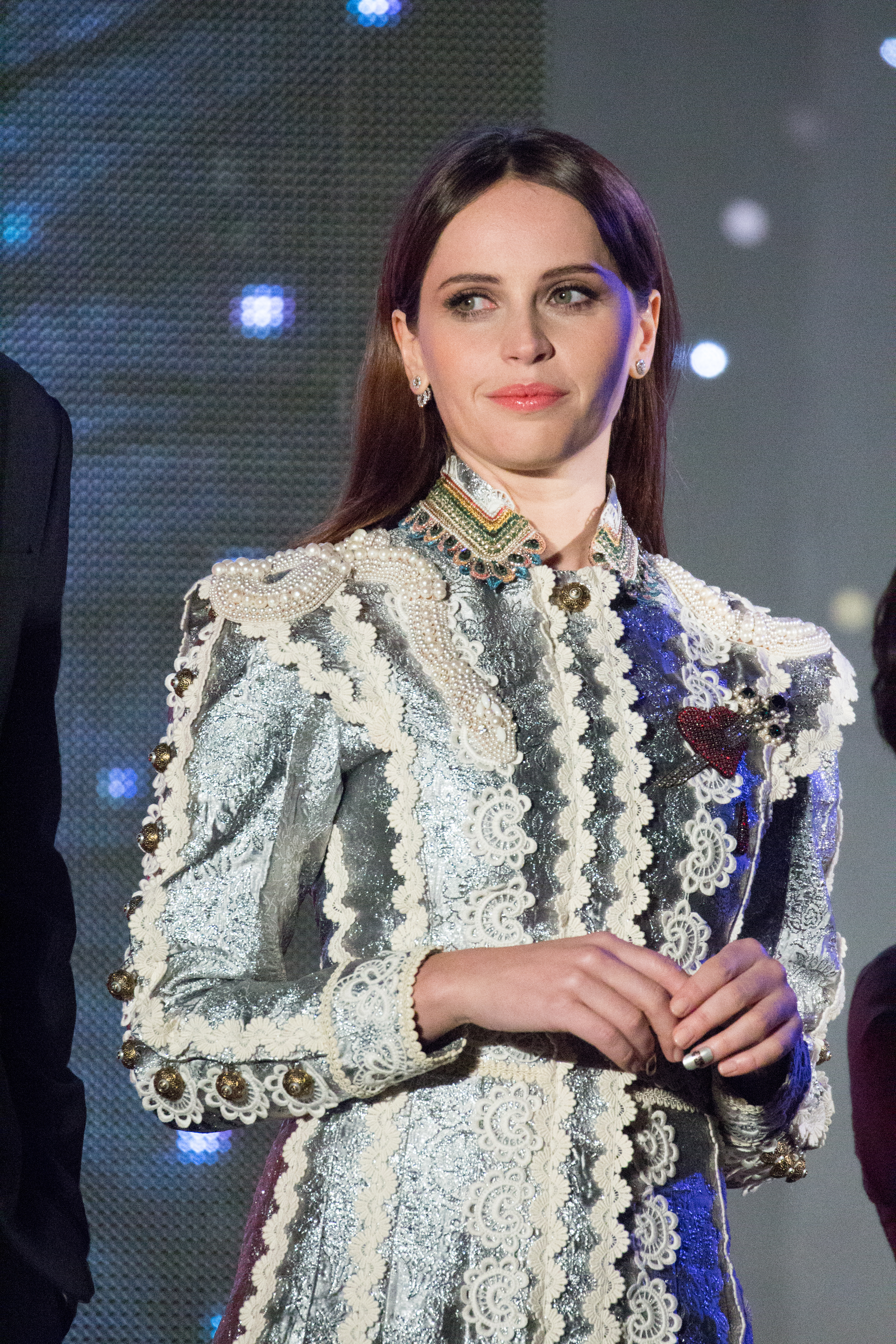 ローグ・ワン/スター・ウォーズ・ストーリー ジャパン・プレミア レッドカーペット フェリシティ・ジョーンズ